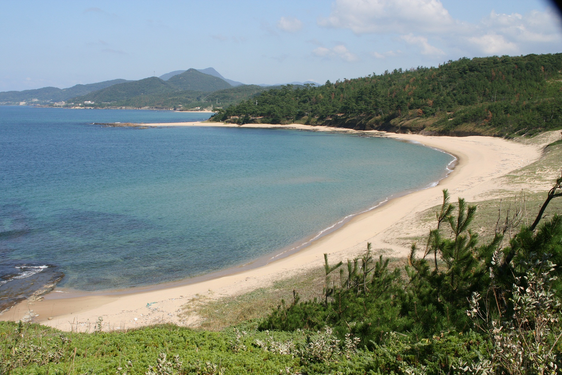 琴引浜（京都府京丹後市網野町掛津）の西側から東側を臨む